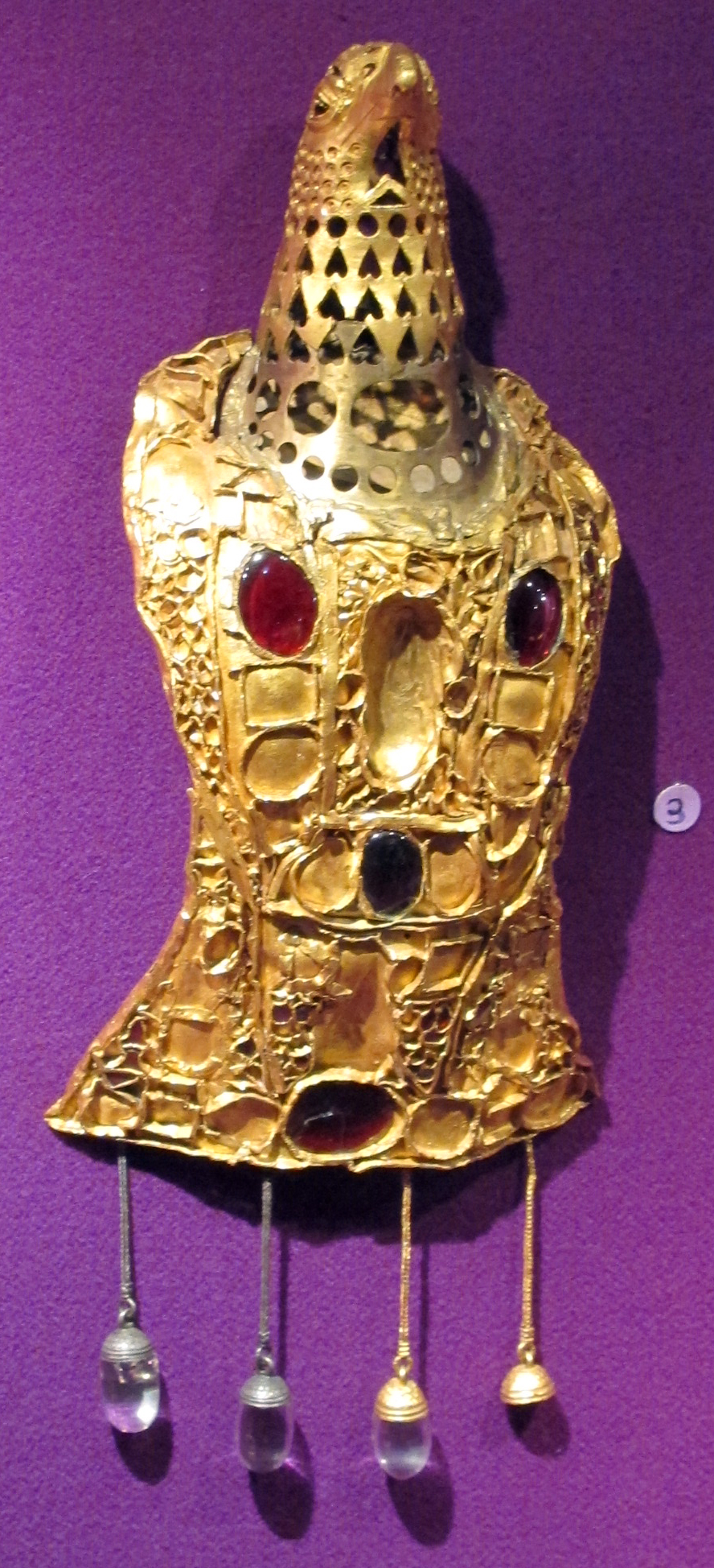 Tesoro di pietroasele, grande fibula a forma d'aquila, IV-V sec